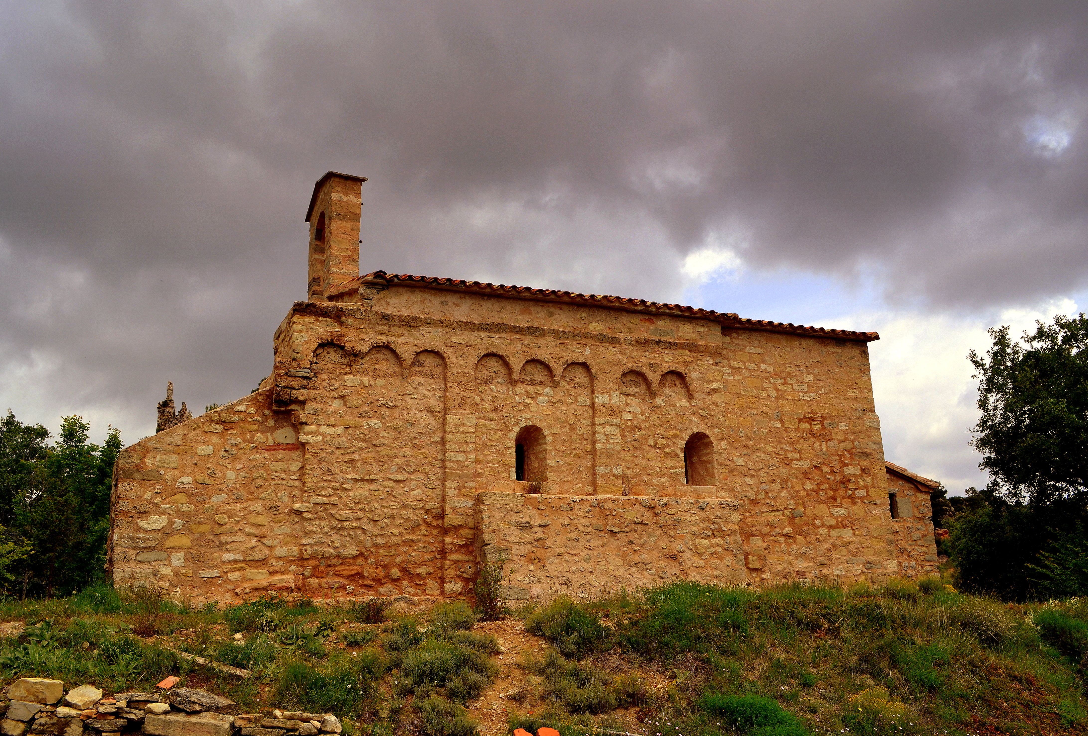 Església de Sant Jaume de Queralt (antigament Sant Cristòfol). Situada al peu de la mola rocosa dominada pel castell de Queralt